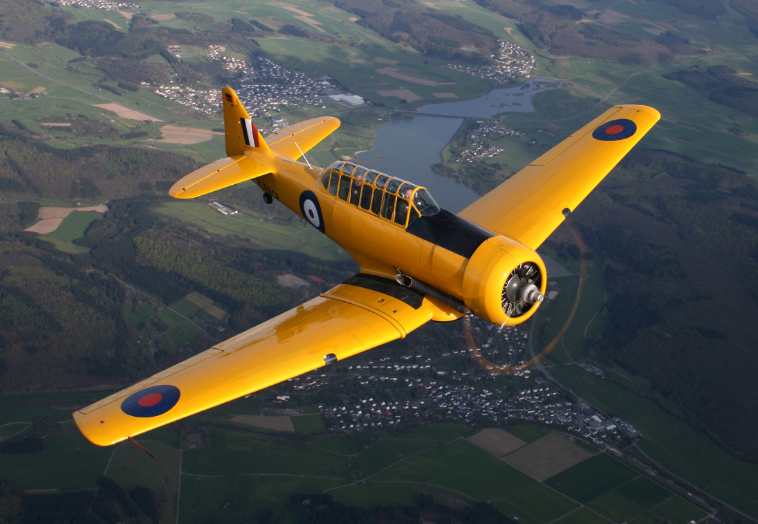 Eine von Noorduyn Aviation produzierte Harvard T6/AT16 II B mit der Kennung D-FRCP